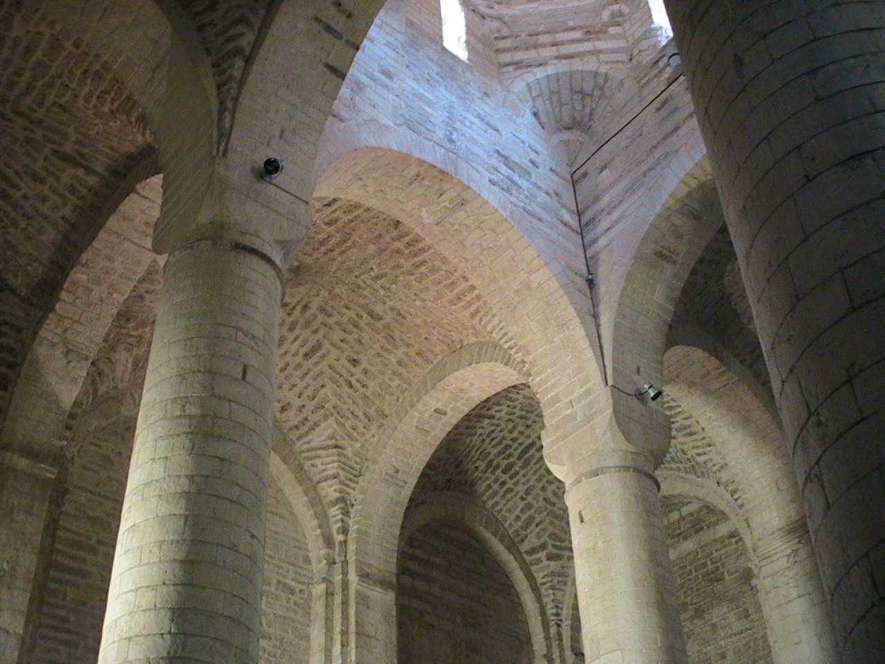 Abbazia di San Vittore a Genga. Autore RBell 17:58, 10 apr 2007 (CEST)